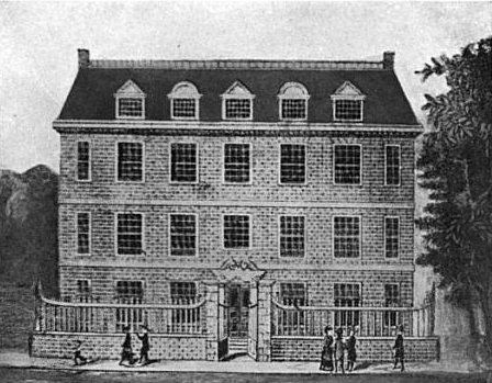 Clark-Frankland house, Garden Court, Boston